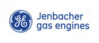 GE Jenbacher Gas Engines Logog